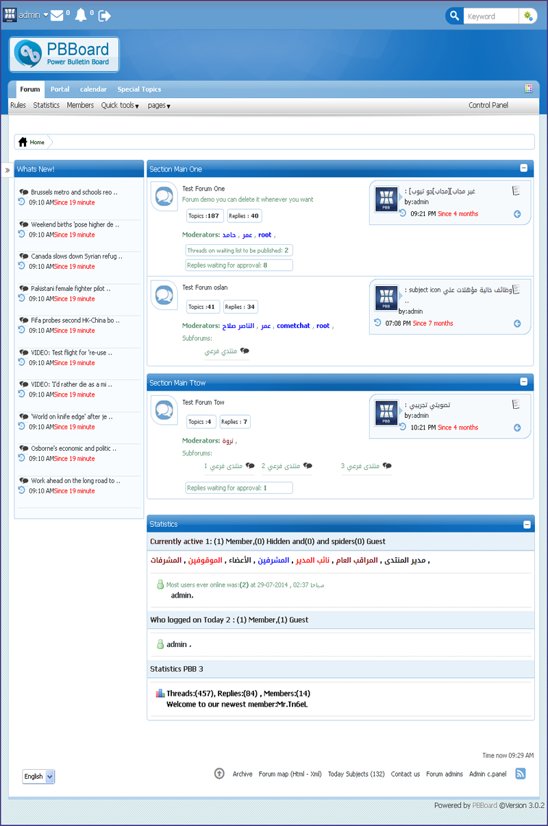 Screenshot PBBoard 3.0.2